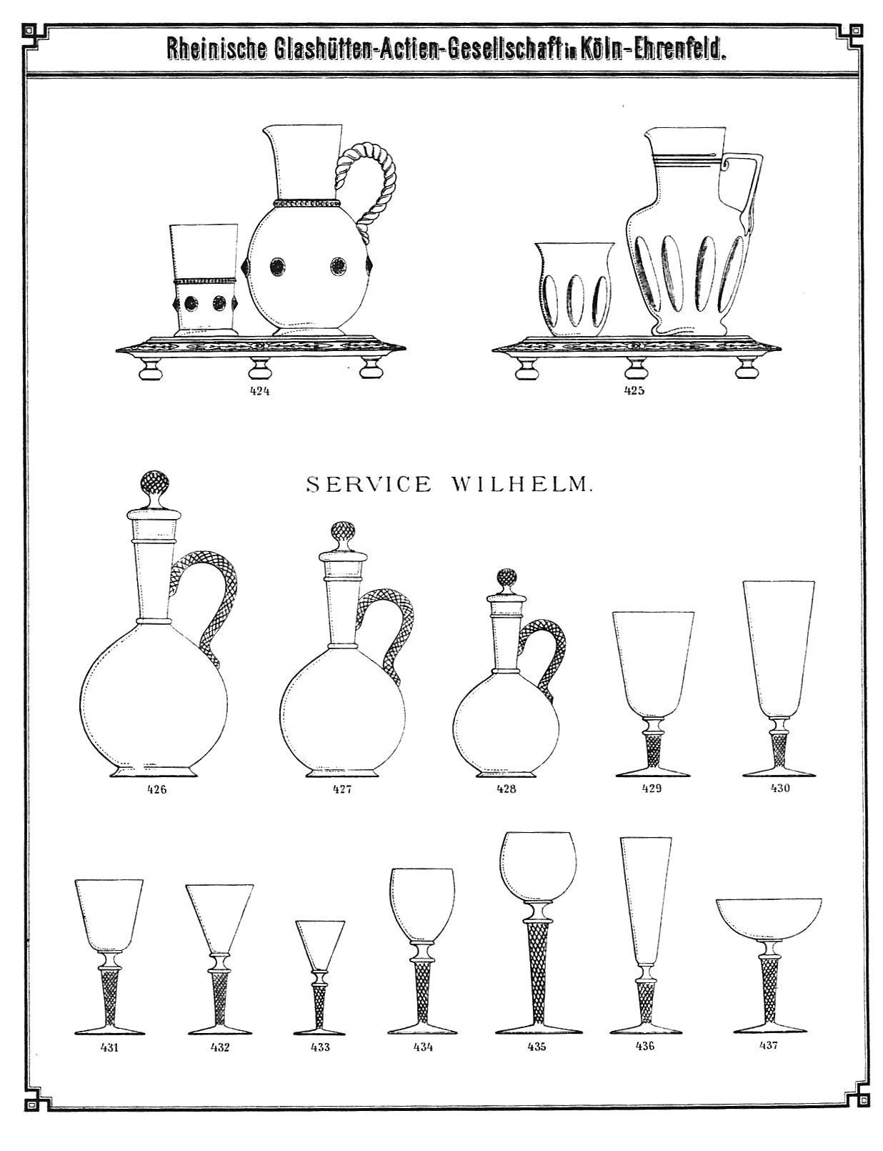 Musterblatt aus dem Preiscourant der Rheinischen Glashütten AG 1886: Glasserie Wilhelm